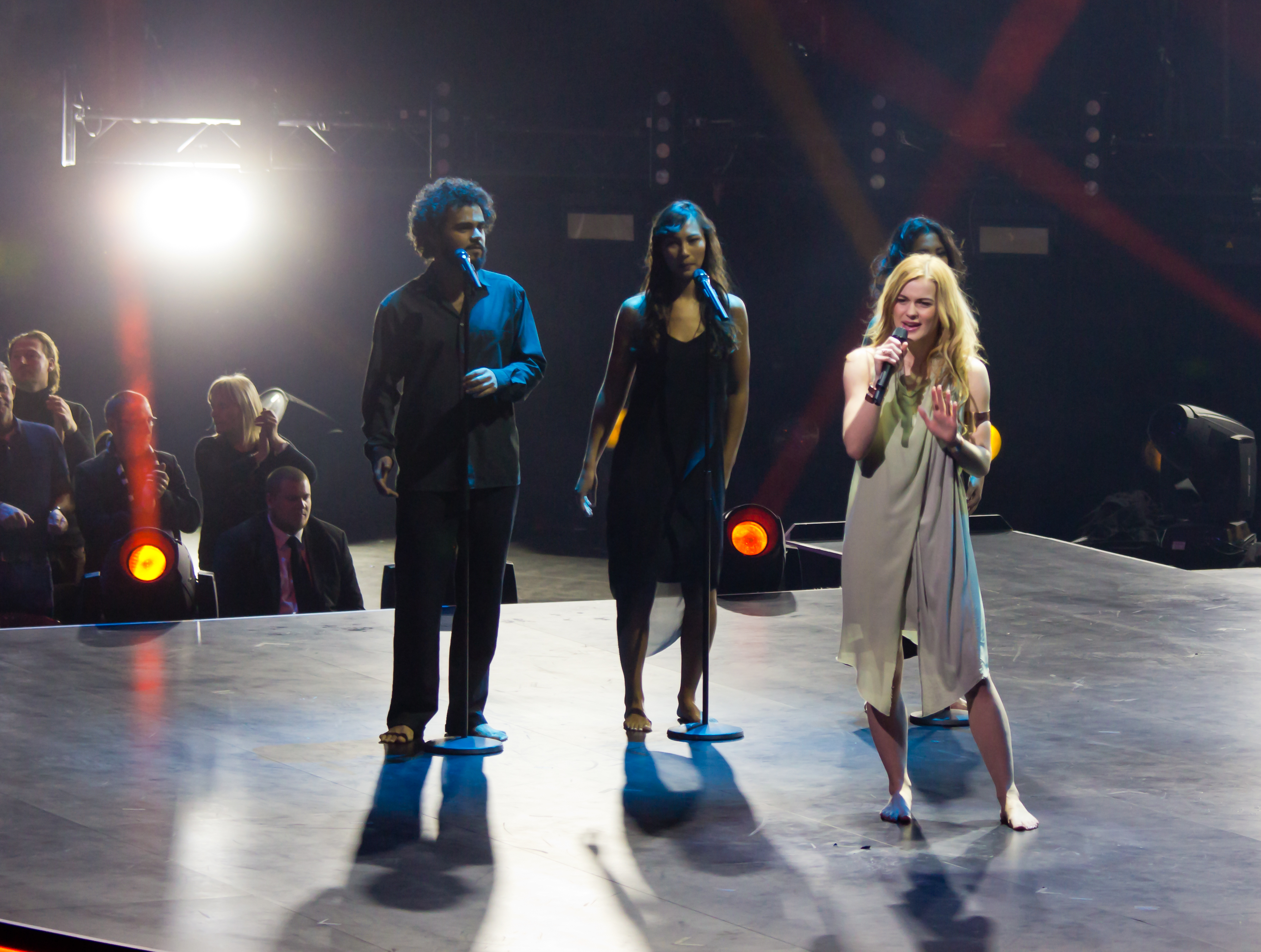 Unser Song für Dänemark - Livesendung Foto: Emmelie de Forest sang "Only Teardrops", mit dem sie 2013 den Eurovision Song Contest nach Dänemark holte, zu Beginn der Sendung.